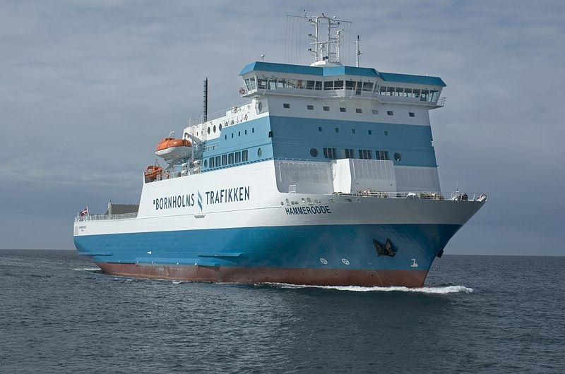 BornholmerFærgen MS Hammerodde - IMO: 9323699 - Call Sign: OYAX Ankomst til Rønne, 22. april 2005